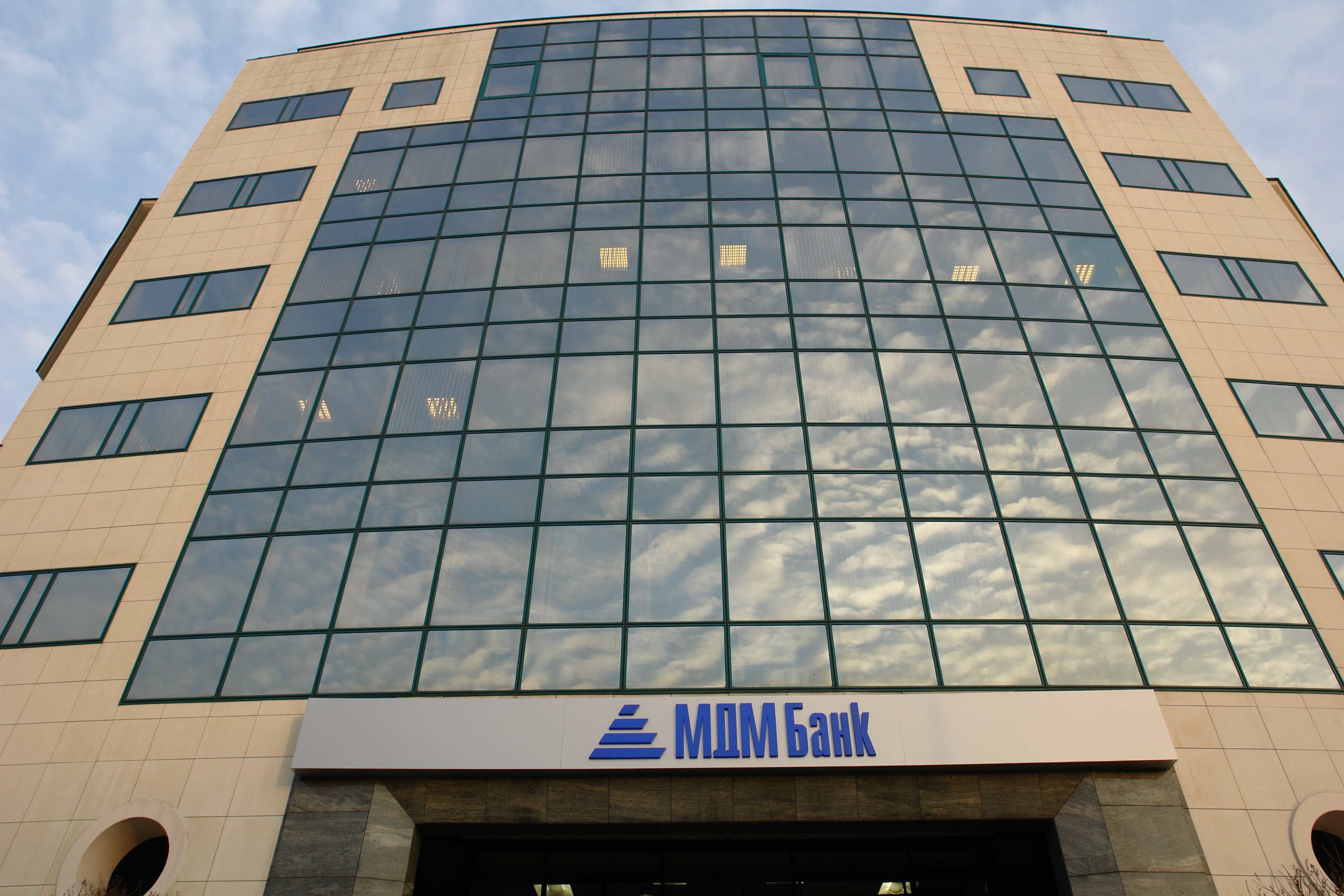 Центральный офис, 2005 г. Открытое акционерное общество «МДМ-Банк»